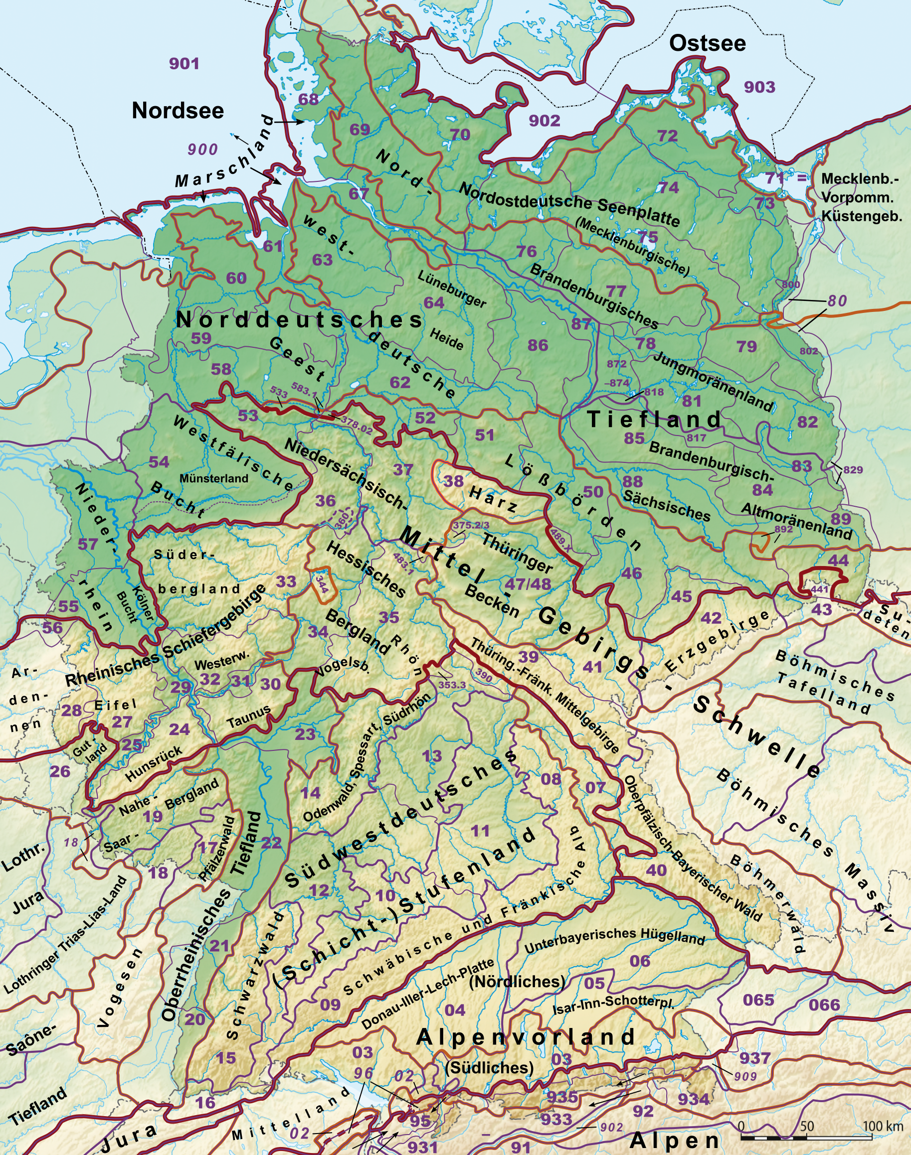 Karte der Naturräumlichen Großregionen Deutschlands Legende Großregion 1. Ordnung (dunkelrote Linien) Großregion 2. Ordnung (orangefarbene Linien) Großregion 3. Ordnung (dick-violette Linien) bzw. zweiziffrige Haupteinheitengruppen (dünn-violette Linien) nach dem Handbuch der naturräumlichen Gliederung Deutschlands. Georeferenziertes Bild siehe Export-Tab für die Verwendung in WMS-fähigen Software-Programmen wie Java OpenStreetMap Editor